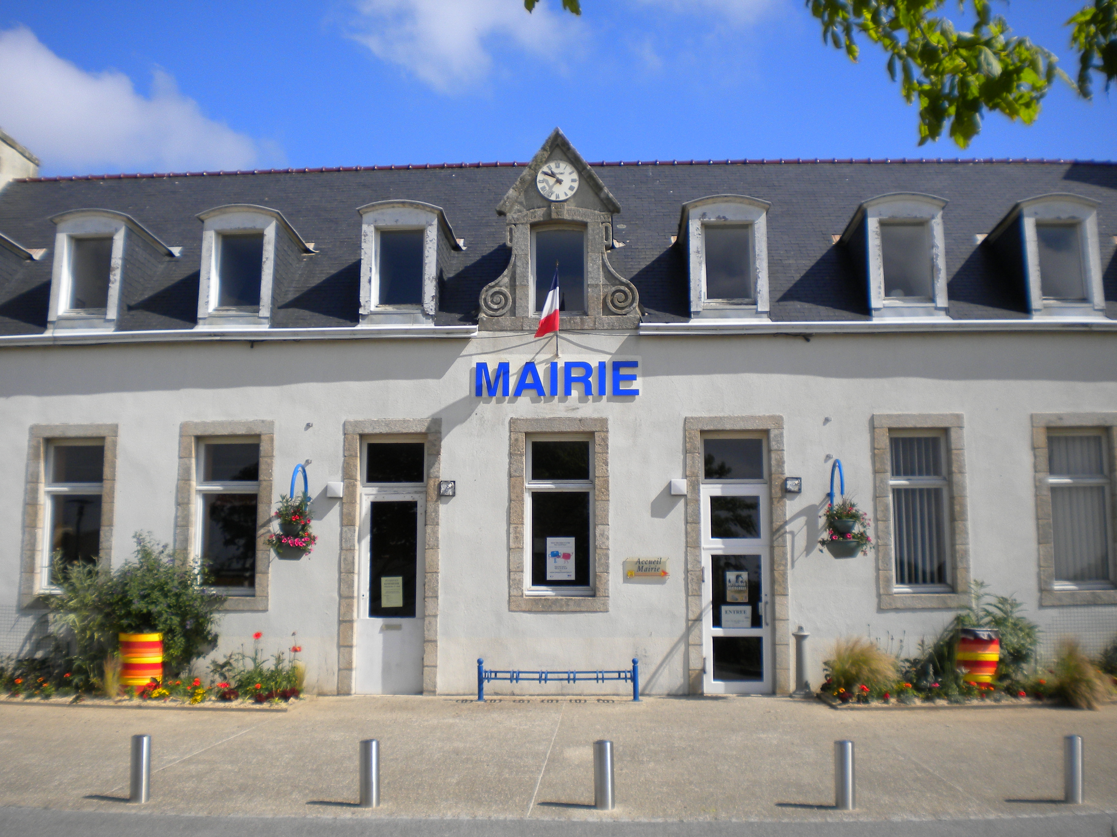 Ti-kêr Plozeved, Bro Gerne, Breizh.